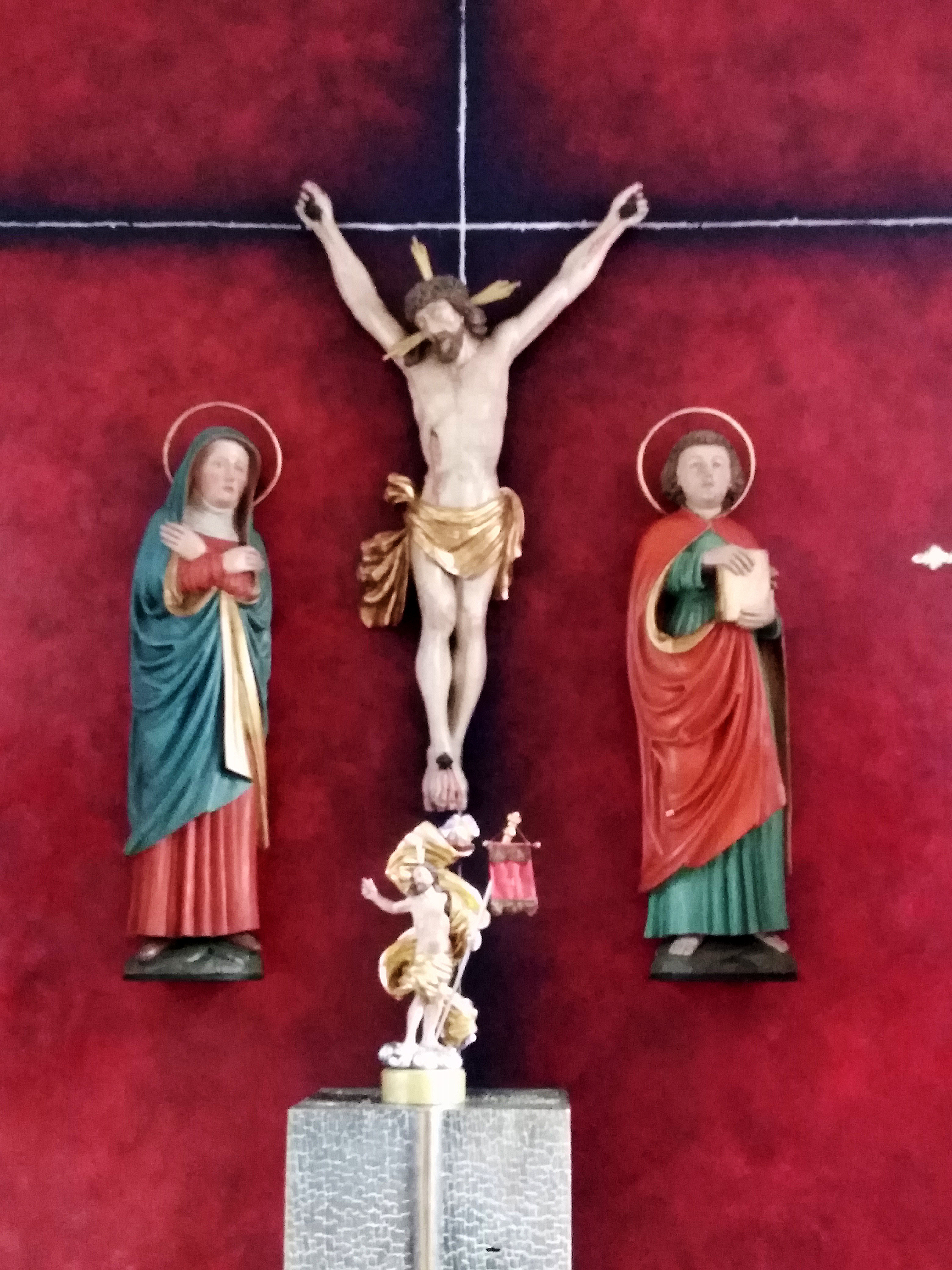 Stetten ob Rottweil, St. Leodegar, frühgotische Skulpturen Maria und Johannes unter dem Kreuz